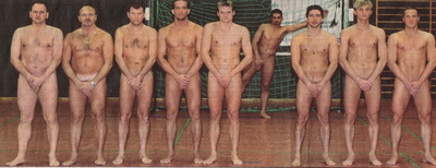 Photo der Oberligamannschaft 2003 des SC Fortuna Köln. Alle Spieler und Trainer werben nackt mit dem Bildtitel "Einem nackten Mann greift man nicht in die Tasche - aber unter die Arme" für Spenden und den Erlass der Gläubigerforderungen an den von der Insolvenz bedrohten Verein.